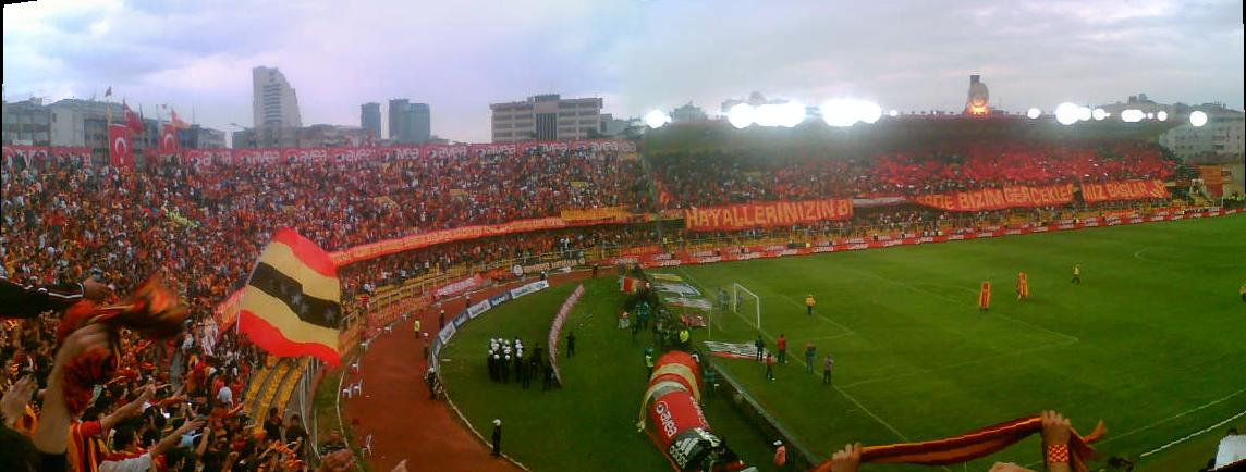 GS-FB_Süperlig_19_Mayıs_2007_Sahne-Başlangıç